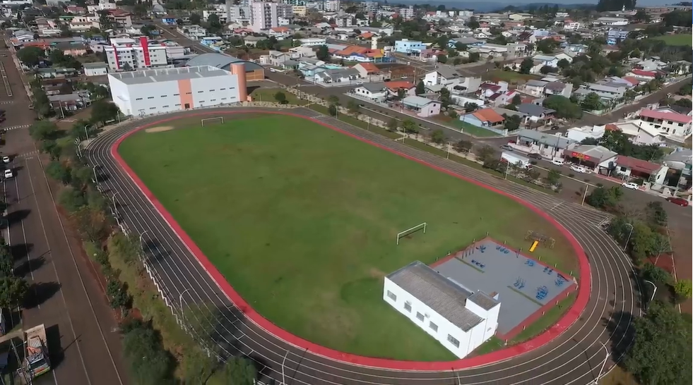 Complexo Esportivo de Faxinal dos Guedes